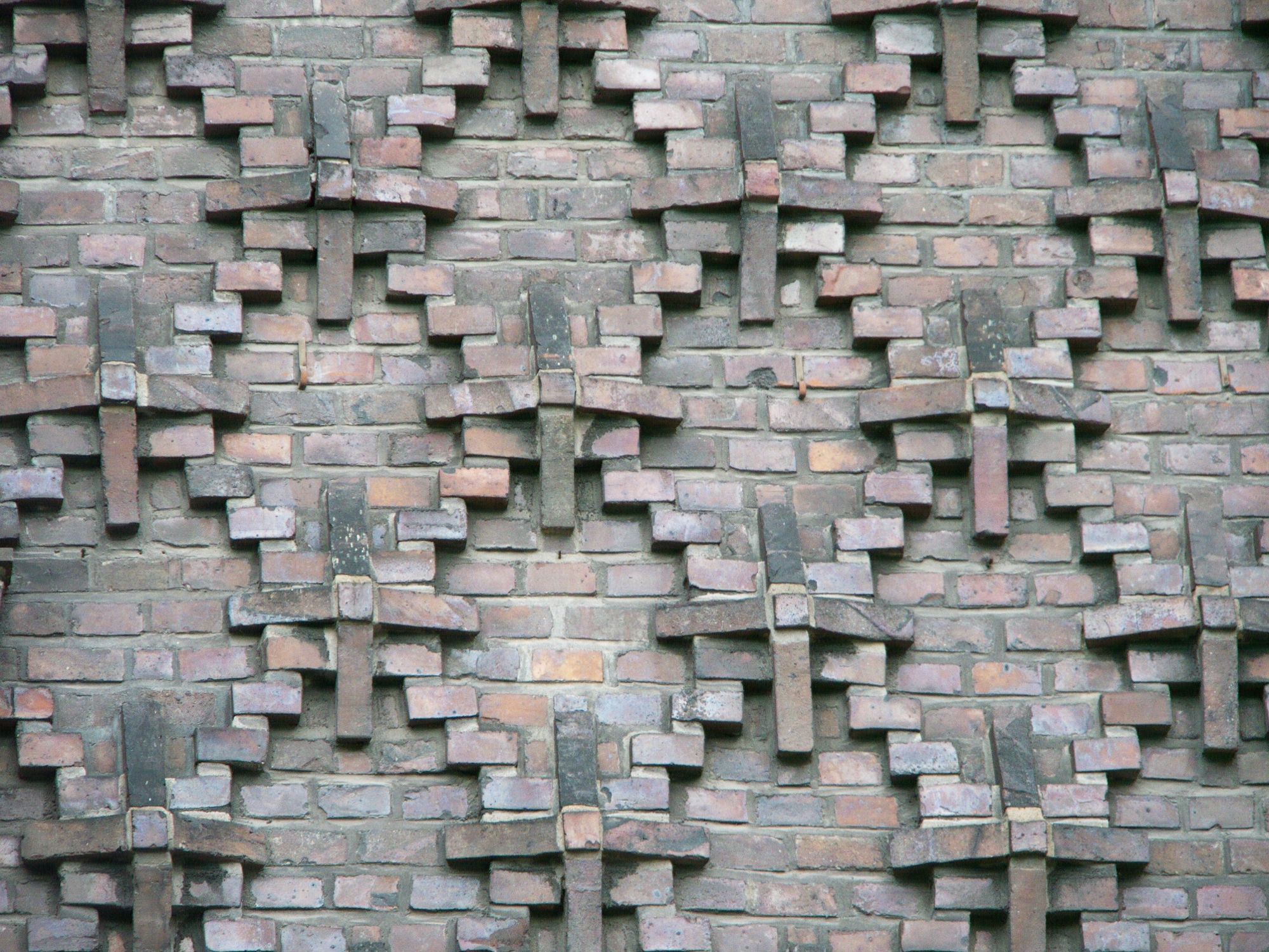 Chilehaus - Klinker-Dekor am Torweg This is a photograph of an architectural monument.